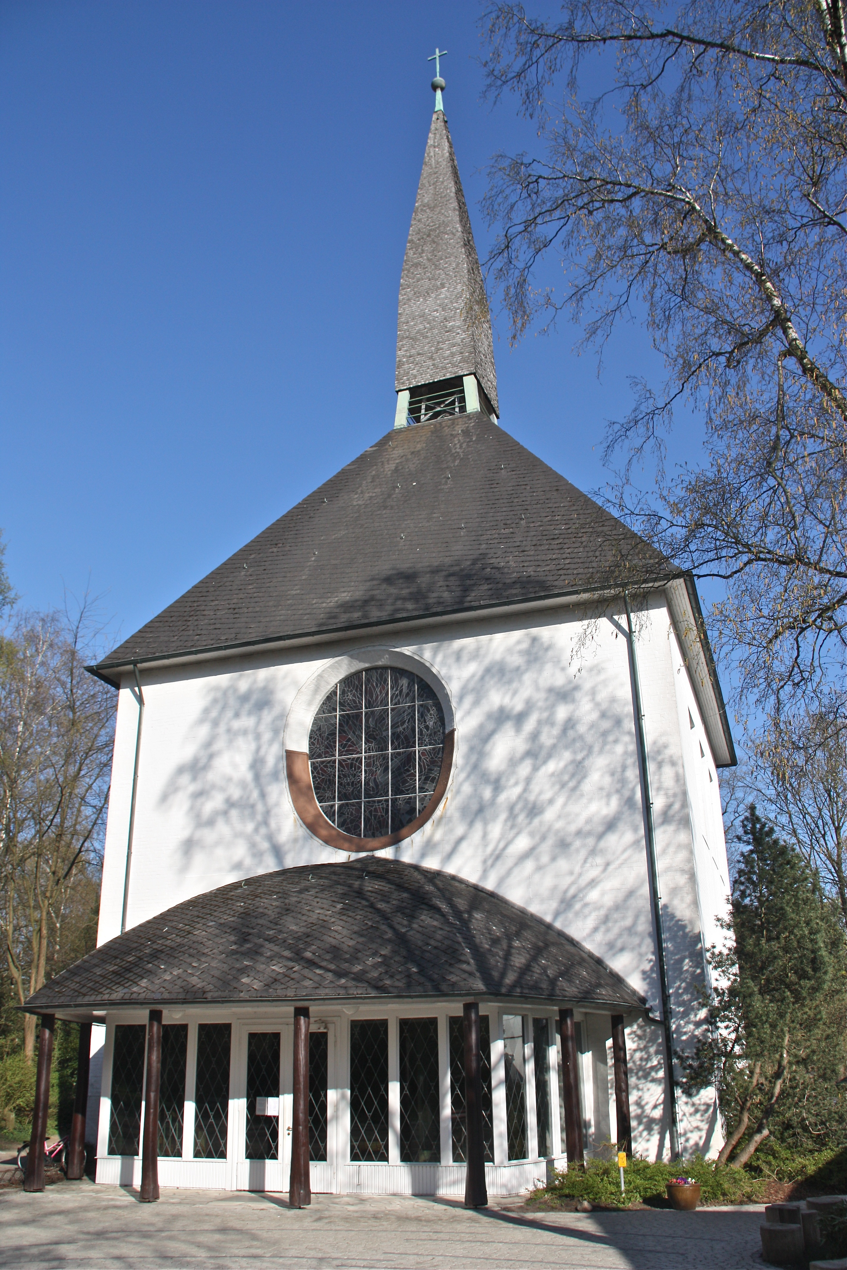 Hamburg, Bergedorf, Kirche St. Michael, Westseite